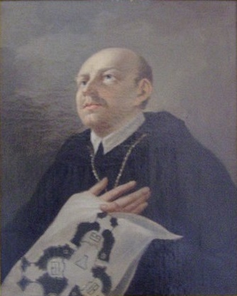 Abt Maximilian Pagl auf einem Gemälde aus dem Stift Lambach